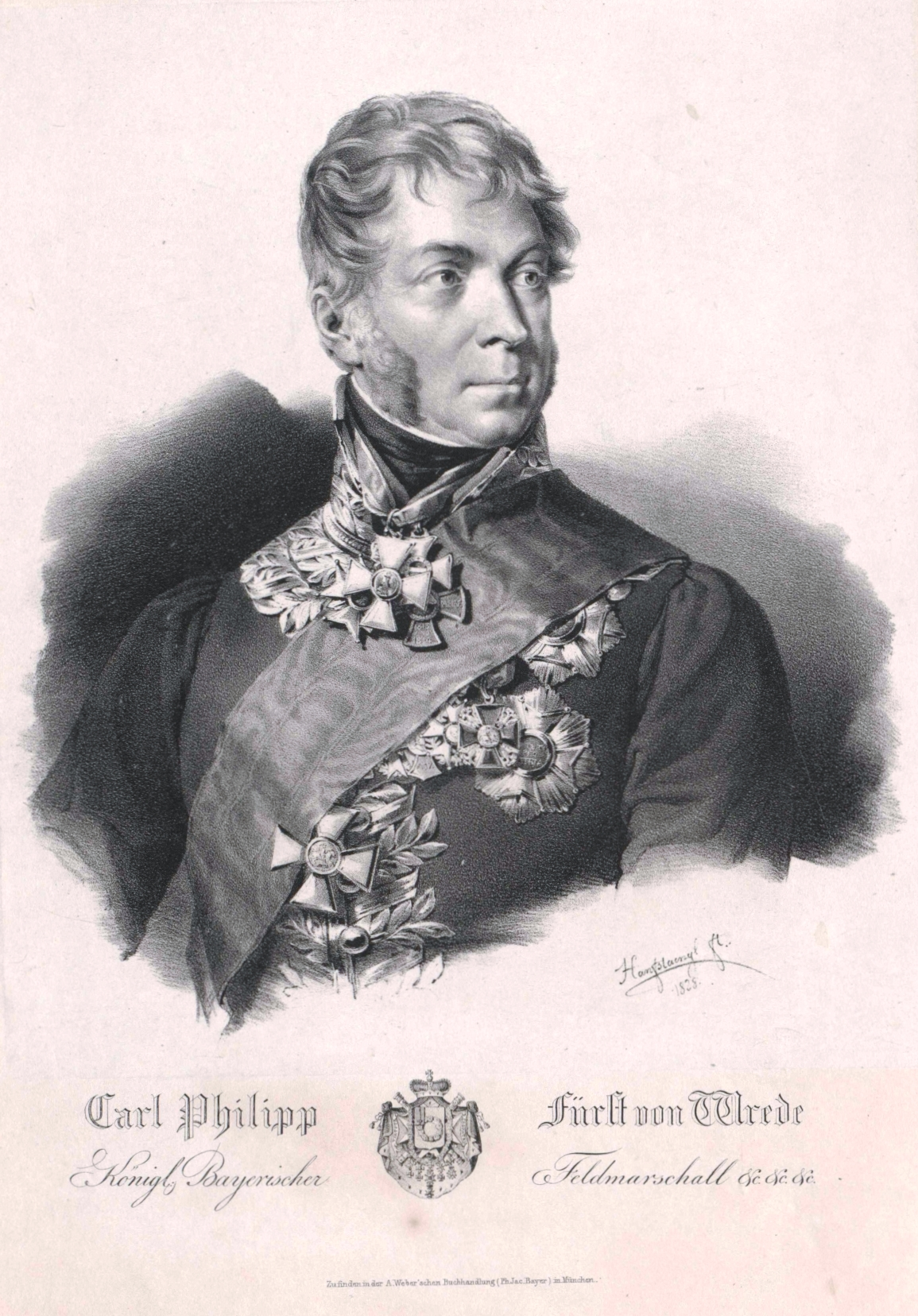 Karl Philipp Fürst von Wrede (1767-1838), Lithography.